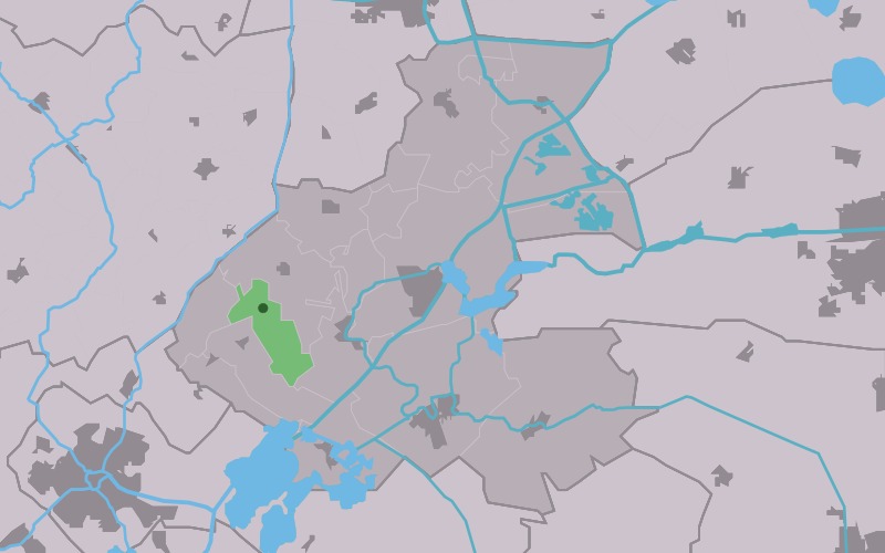 Kaartsje fan himrik fan Poppenwier